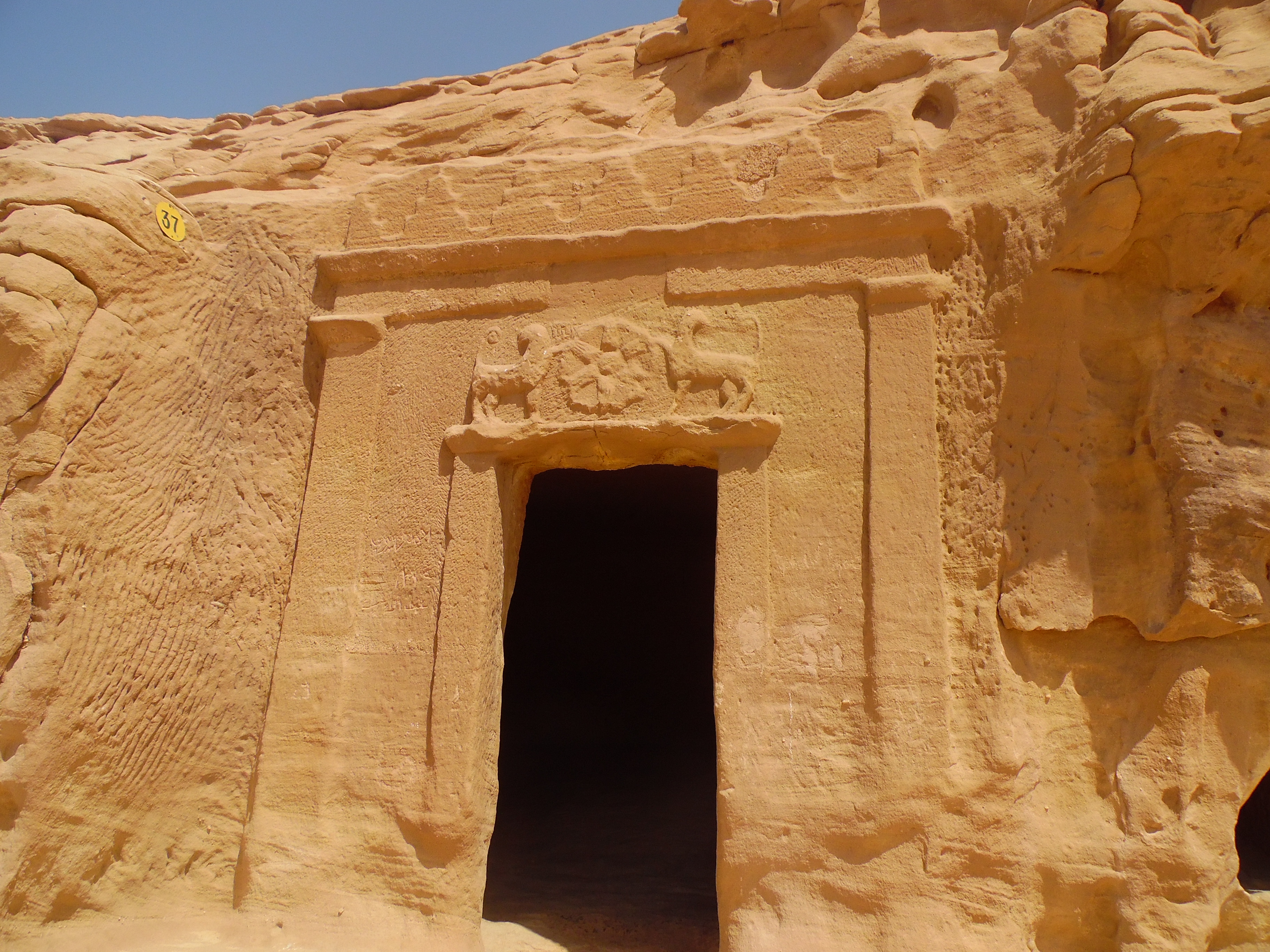 Entrada de una de las sepulturas nabateas en Madain Saleh, Arabia Saudí.